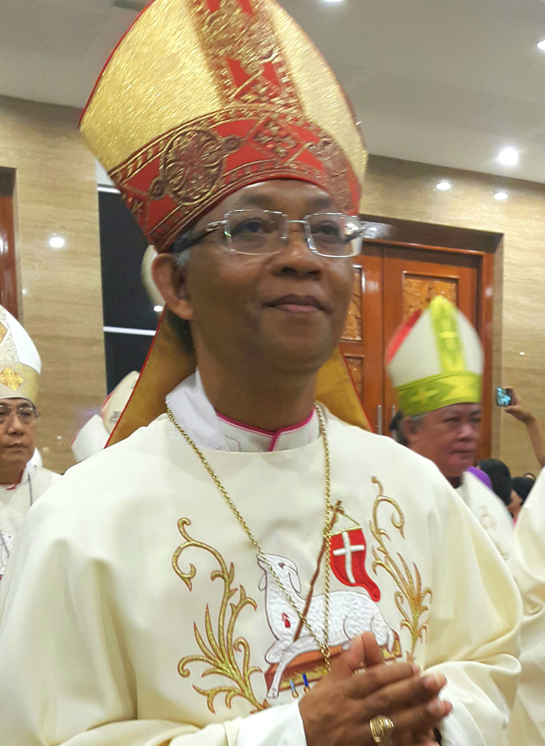 Mgr Paskalis Bruno Syukur, Uskup Bogor